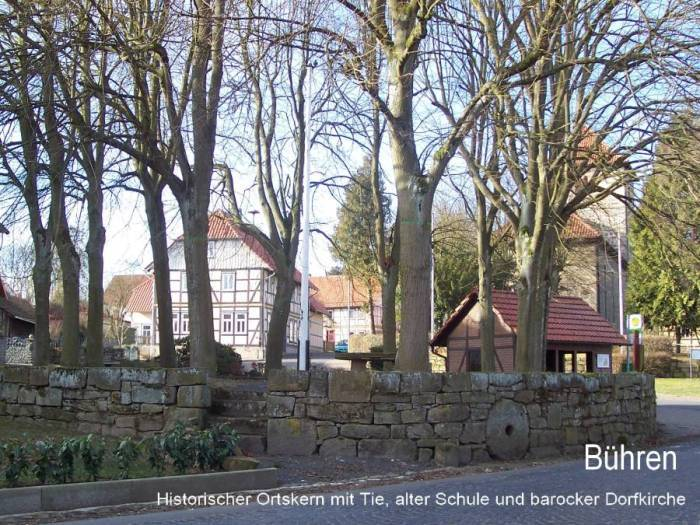 Bühren-Historischer Ortskern